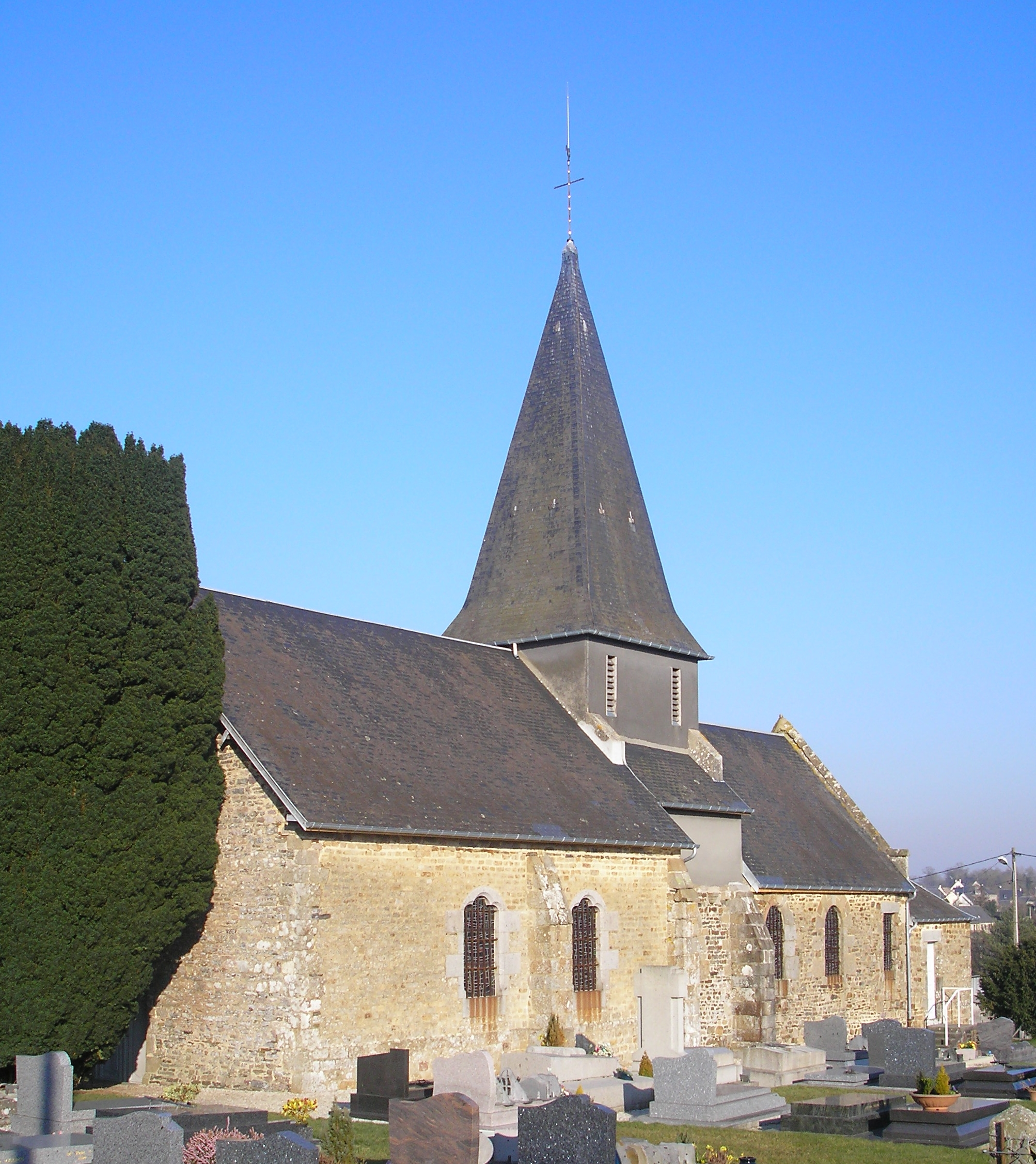 Église d'Étouvy (Calvados, France)